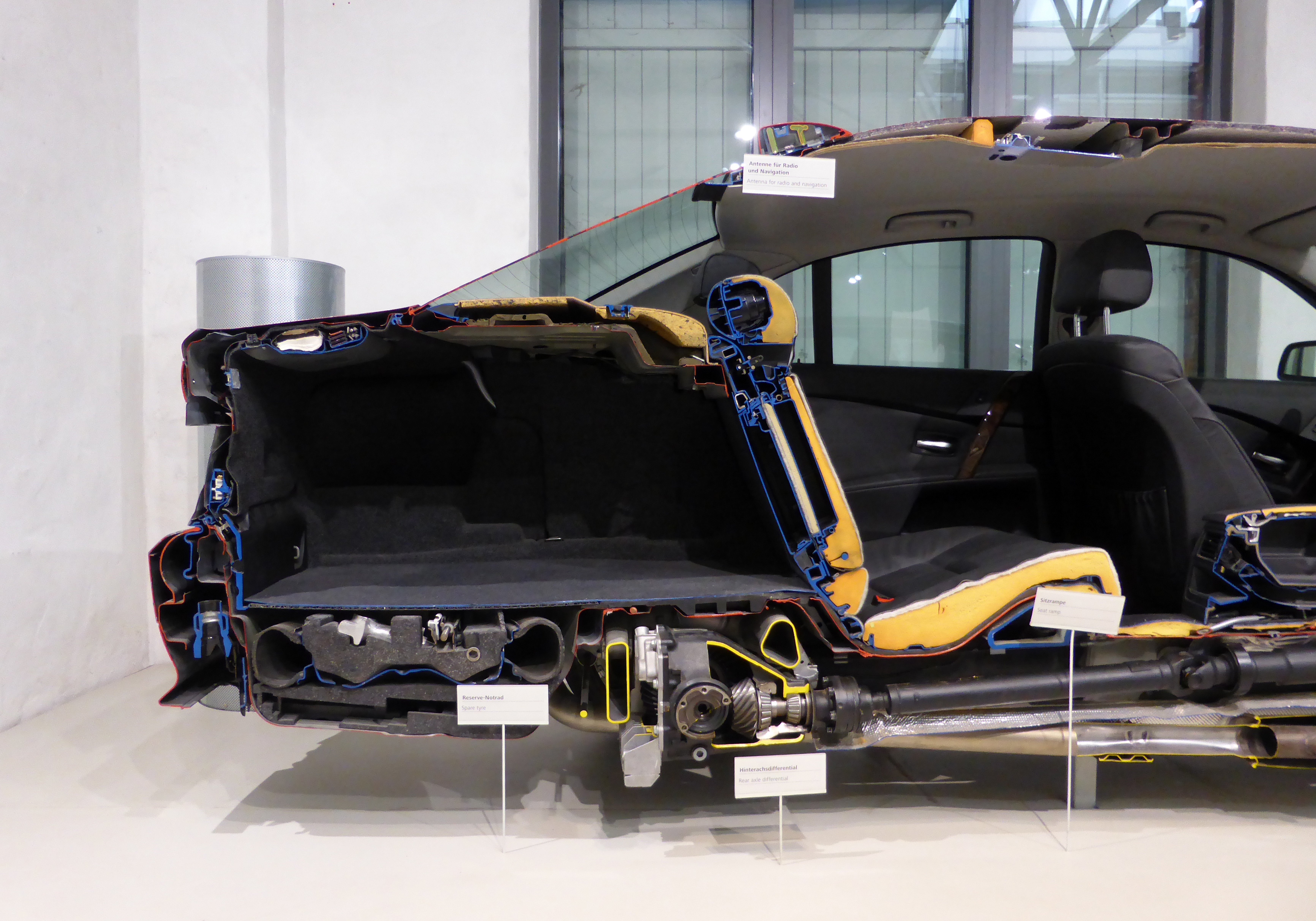 Schnittmodell eines BMW 530d, Baujahr 2009 (BMW E60). Ausgestellt im Deutschen Technikmuseum Berlin. Wikipedianische KulTour am 10. Oktober 2015 in der Ausstellung des Museums.